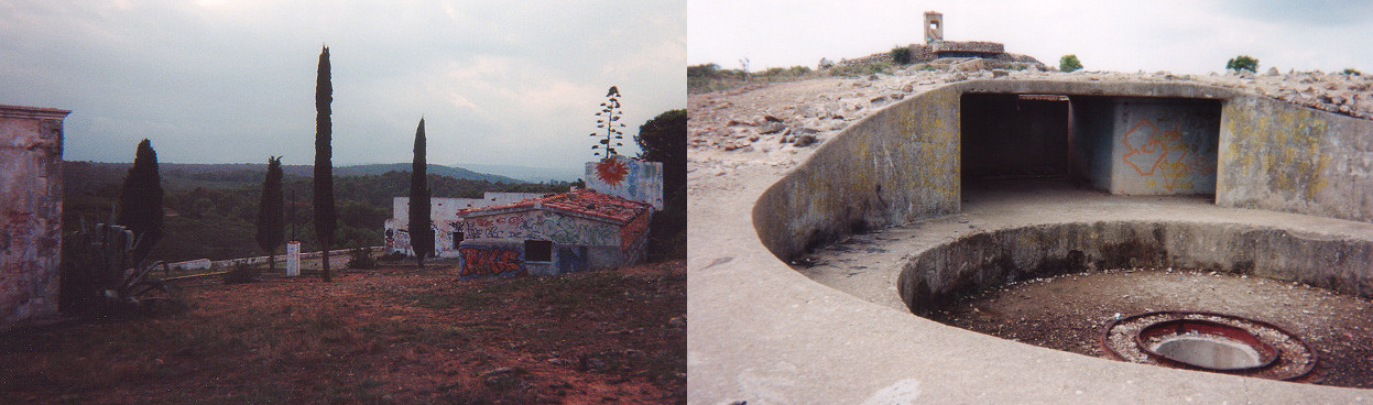 Montgri Massiv Cala Montgo